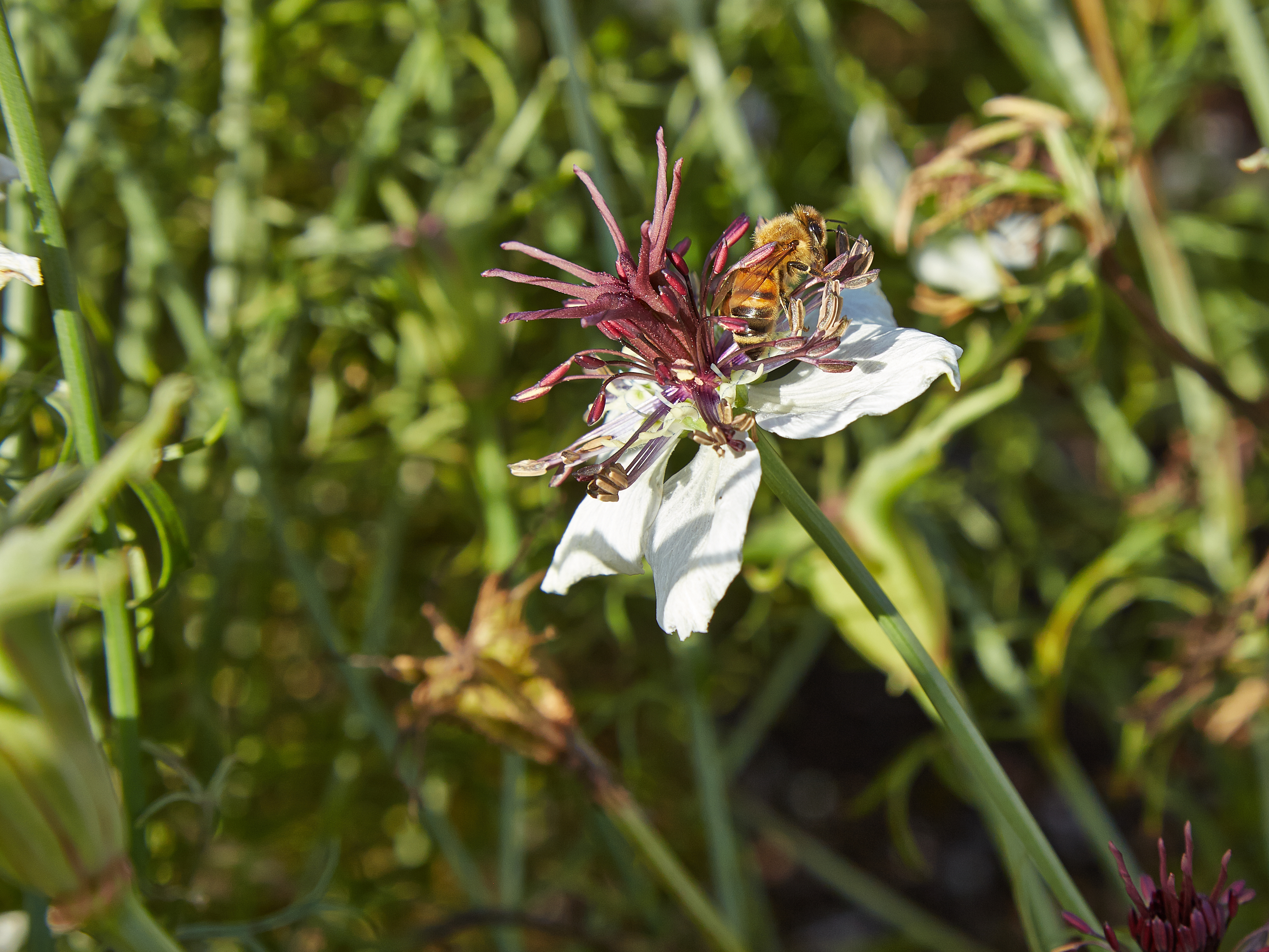 Nigella hispanica i Bergianska trädgården.